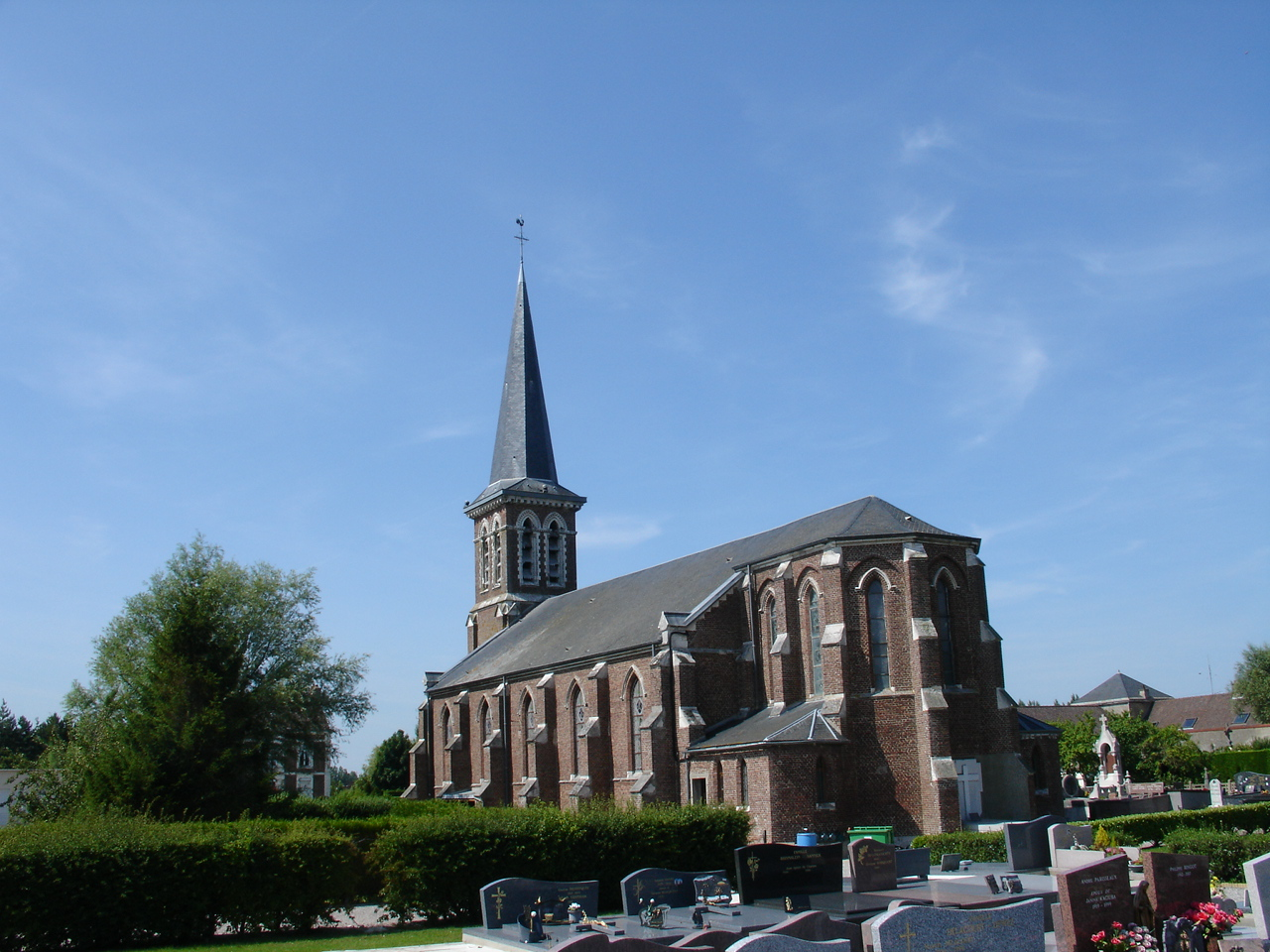 Église des Attaques